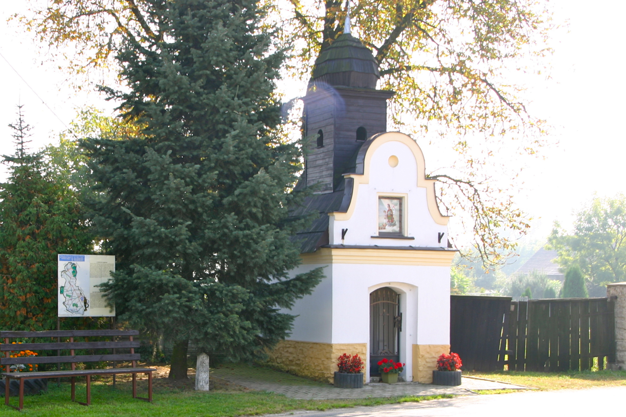 Kamionka (dodatkowa nazwa w j. niem. Kamionka) – wieś w Polsce położona w województwie opolskim, w powiecie kędzierzyńsko-kozielskim, w gminie Reńska Wieś.